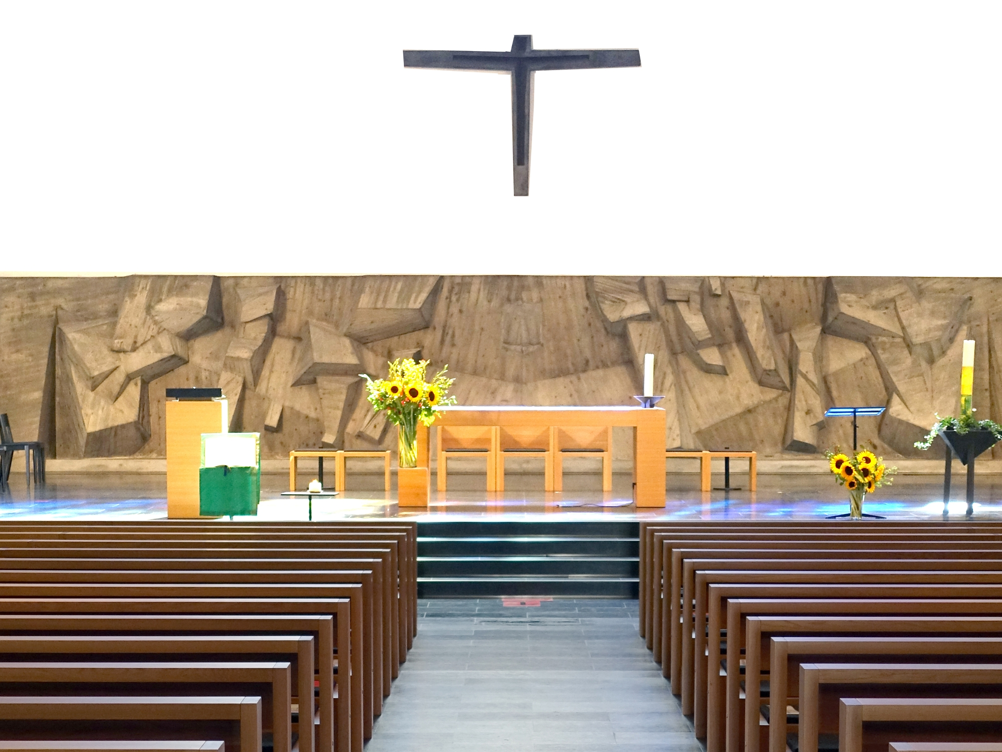 Betonrelief (1964) von Michael Grossert (1927–2014). In der Katholische Kirche St. Nikolaus in Reinach, Baselland